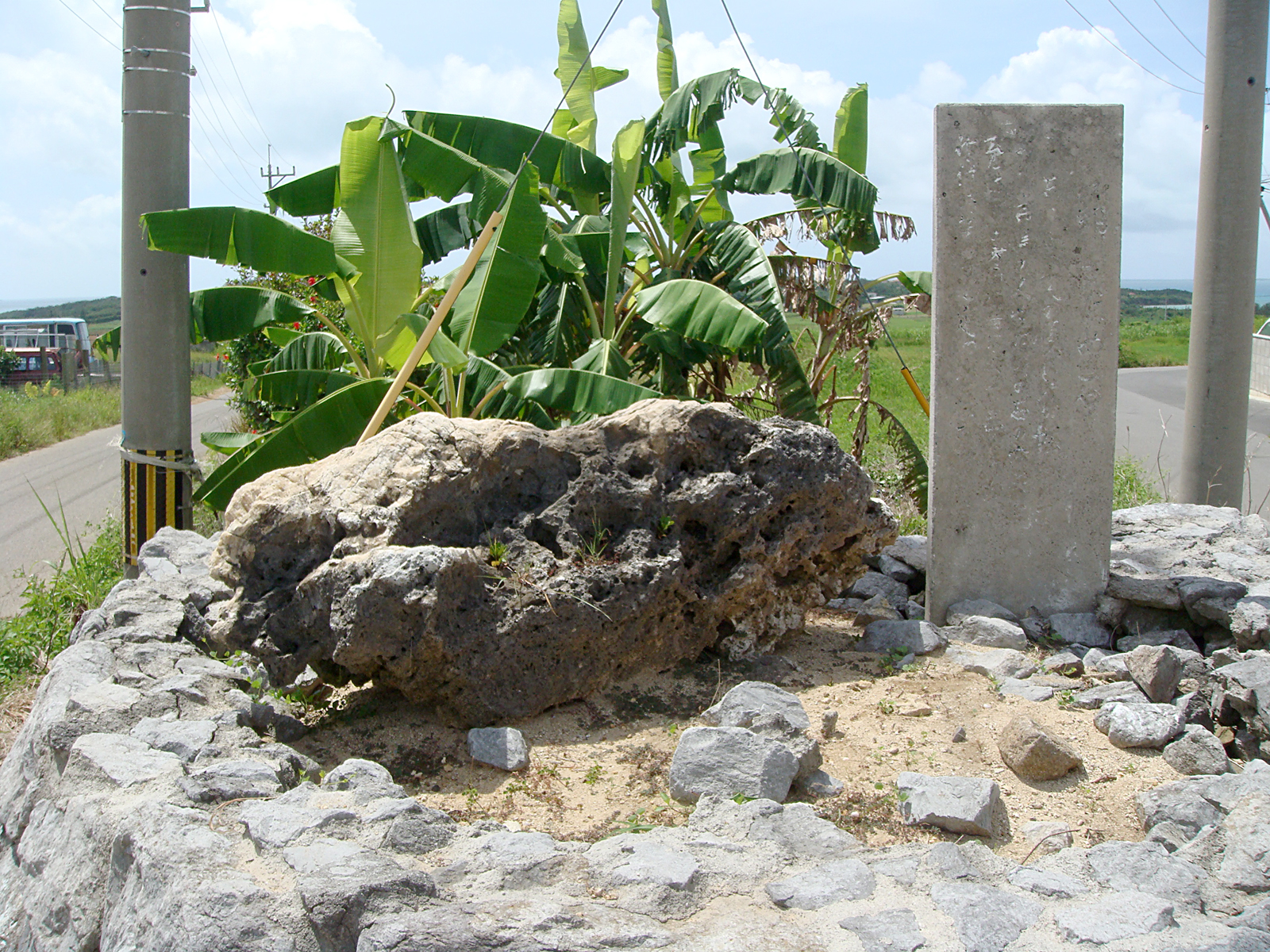 節定め石（沖縄県八重山郡竹富町/小浜島）